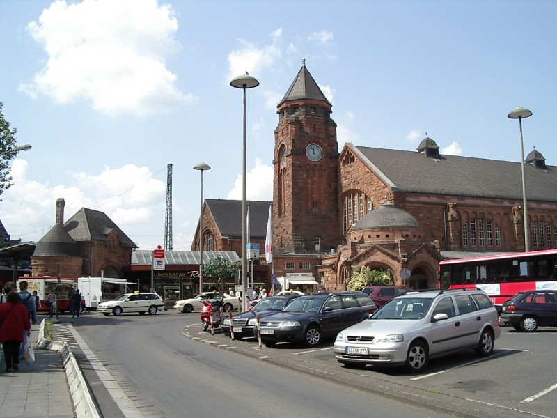 Gießen, Hessen, Deutschland. Bahnhof mit Vorplatz, von östlicher Richtung (ca. 2004-06-01). Quelle Fotographie ca. 2004-06-01 Fotograph --Keichwa Copyright Status GNU Freie Dokumentationslizenz Siehe auch: Bild:Mk Gießen Bahnhof.jpg.